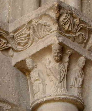 Capitel románico de la Catedral de Roda de Isábena, con la imagen del obispo fundador, San Ramón